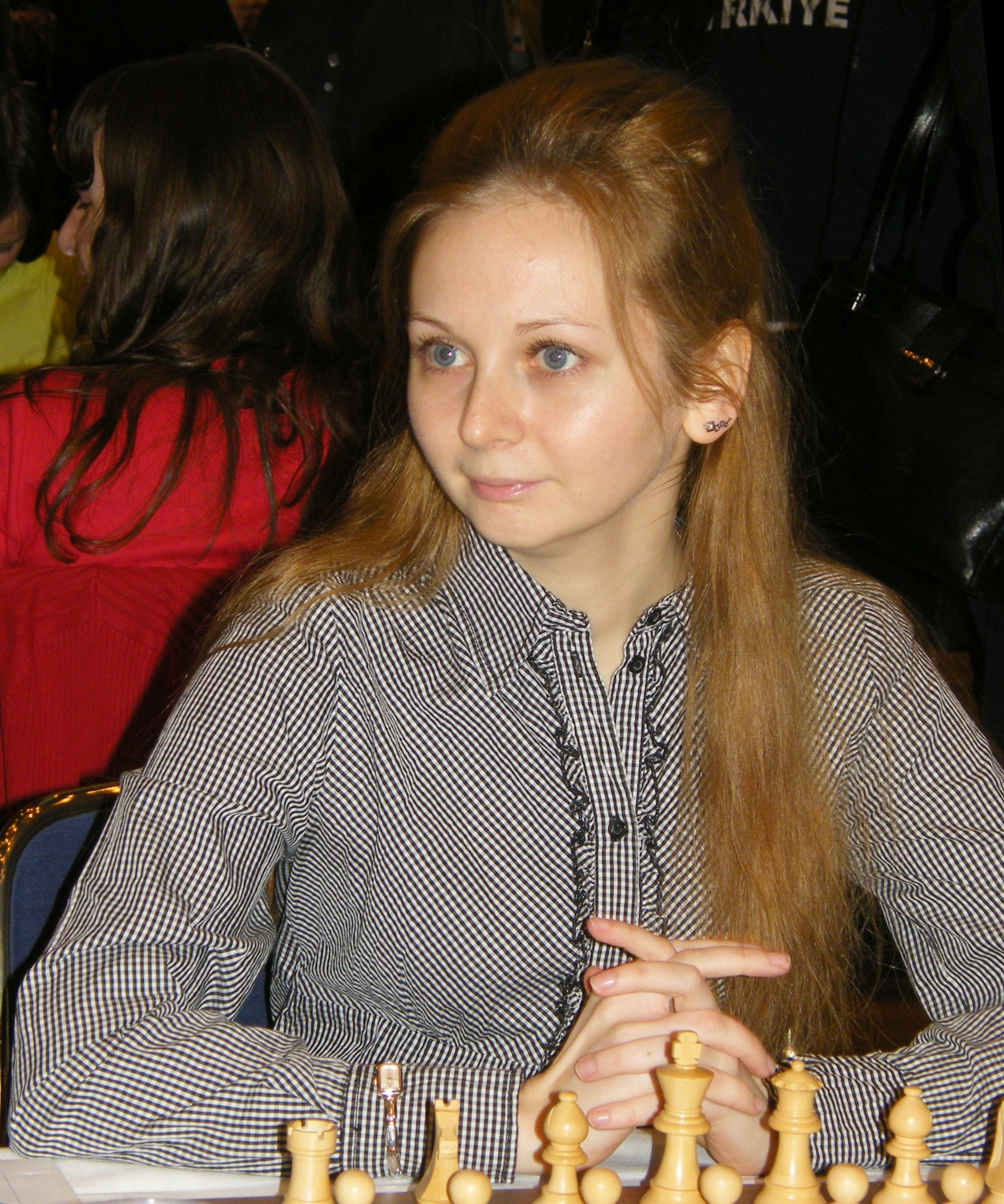 Nadeshda Kosinzewa bei der 38. Schacholympiade in Dresden 2008